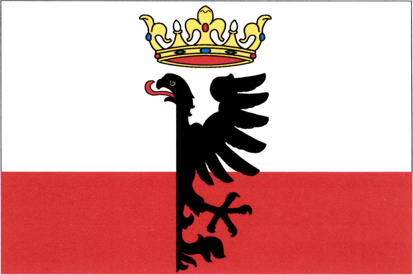 Vlajka obce Zlonice